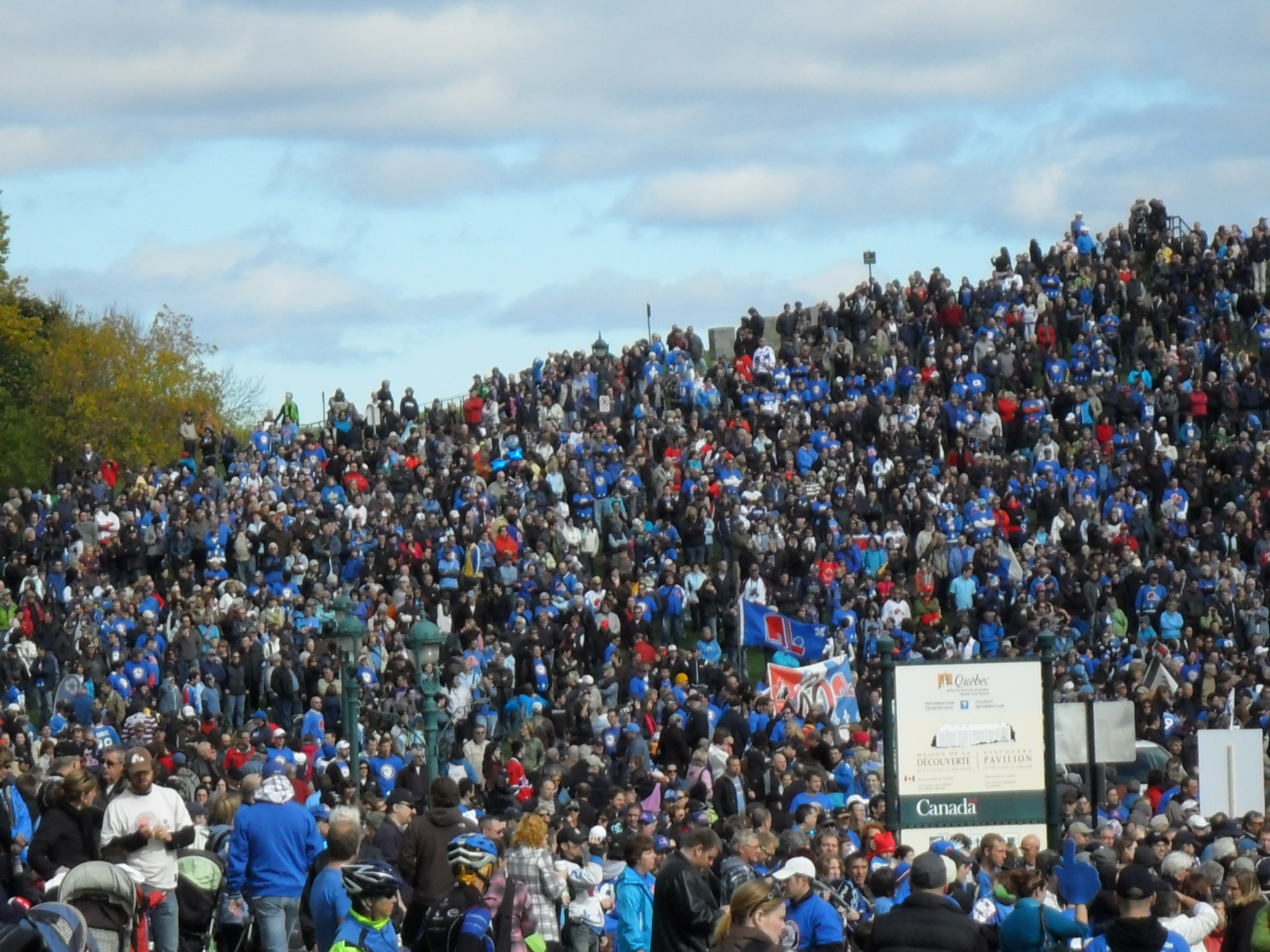 Événement Marche bleue, sur les plaines d'Abraham, en 2010.